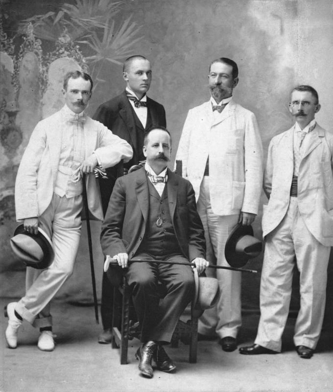 Zentralbild Die Mitglieder der deutschen Gesandtschaft in Peking (China) 1900. UBz: v.l.n.r.: Legationssekretär Dr. Gustav von Bohlen und Halbach (der spätere Chef der Krupp-Werke), Kammerdiener Anton Goebel, der Gesandte Alfons Mumm von Schwarzenstein, Legationsrat Freiherr von der Goltz und Legationskanzlist Dobrikow. Aufnahme vom 24. Juli 1900. Photograph Sciutto, Genua.